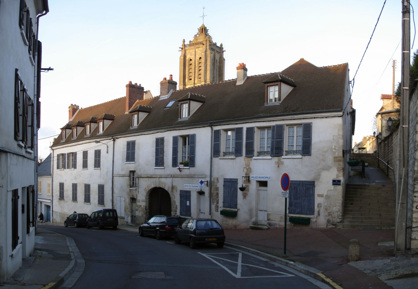 Hotel du Croissant - Beaumont-sur-Oise (France)